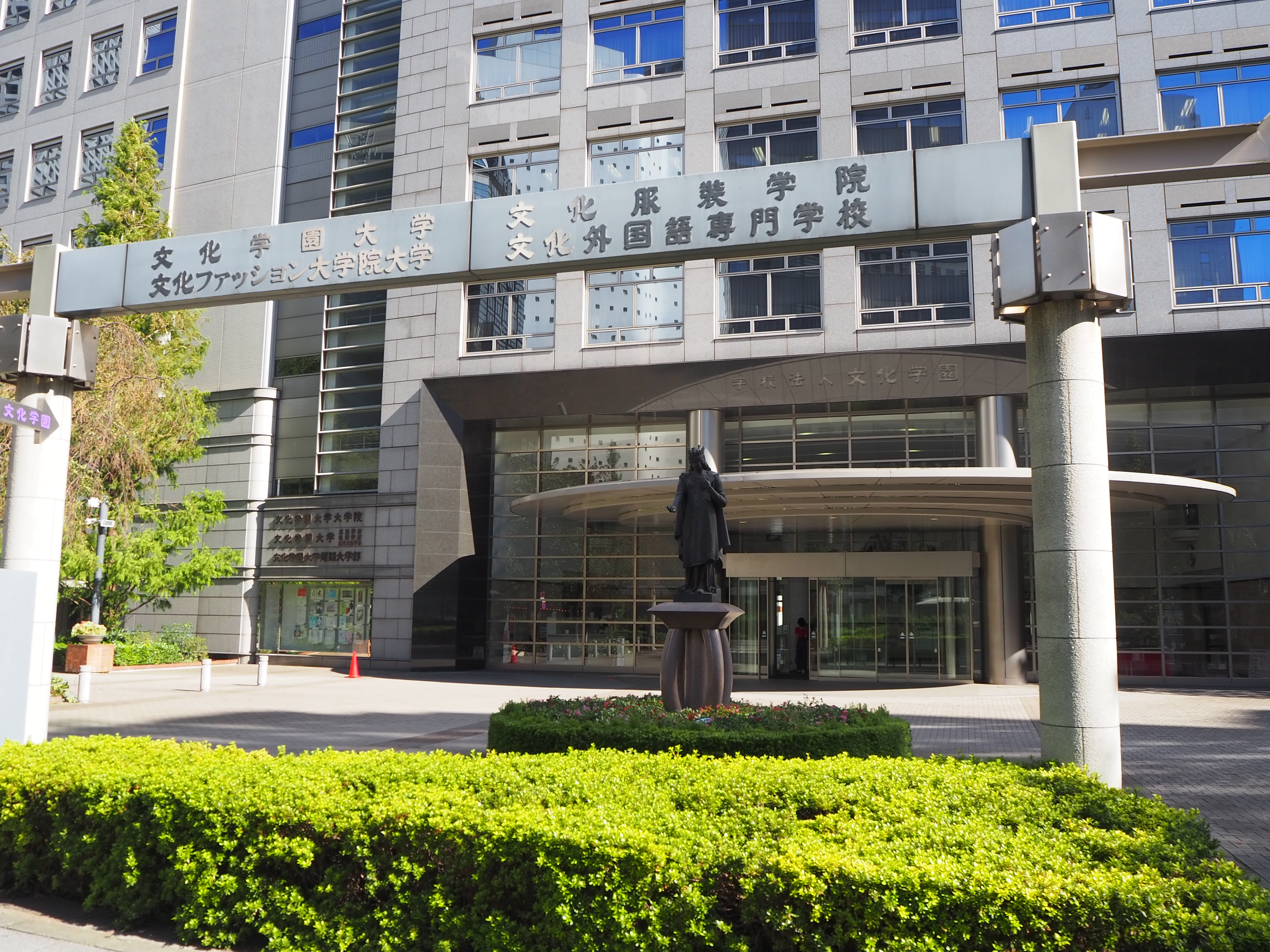 文化学園（文化学園大学、文化服装学院）正門 中文（中国大陆）: 文化学园的正门。